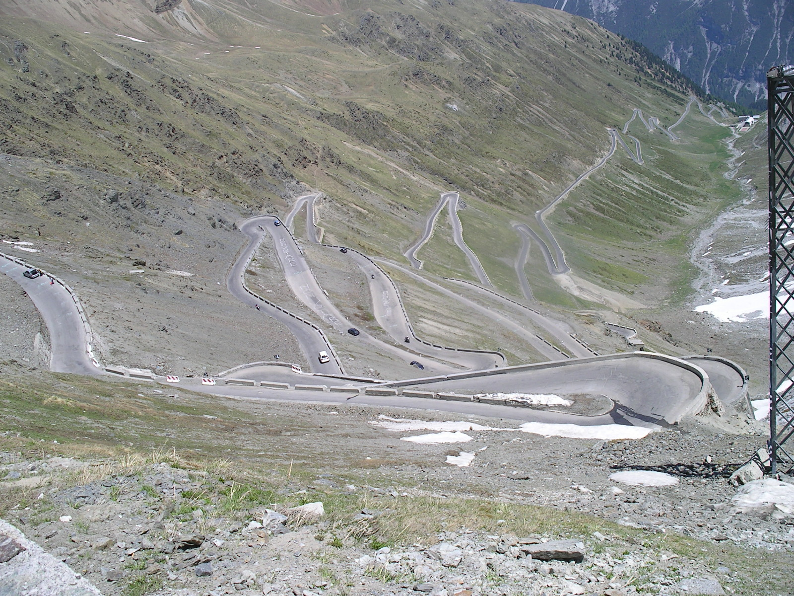 The road to Passo dello Stelvio